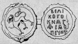 Печать с изображением зверя (льва) влево и надписью «Великого князя Федора печать» на обороте. По мнению А. Б. Лакиера, форма льва с расправленными когтями, положение его хвоста, пригнутого к спине, заставляет подозревать иностранное происхождение этой эмблемы. Лакиер приписывал её Мстиславу Давидовичу, в крещении Фёдору (1219—1230) [1], ныне она атрибутируется как печать Фёдора Ростиславича (1279—1297) [2].